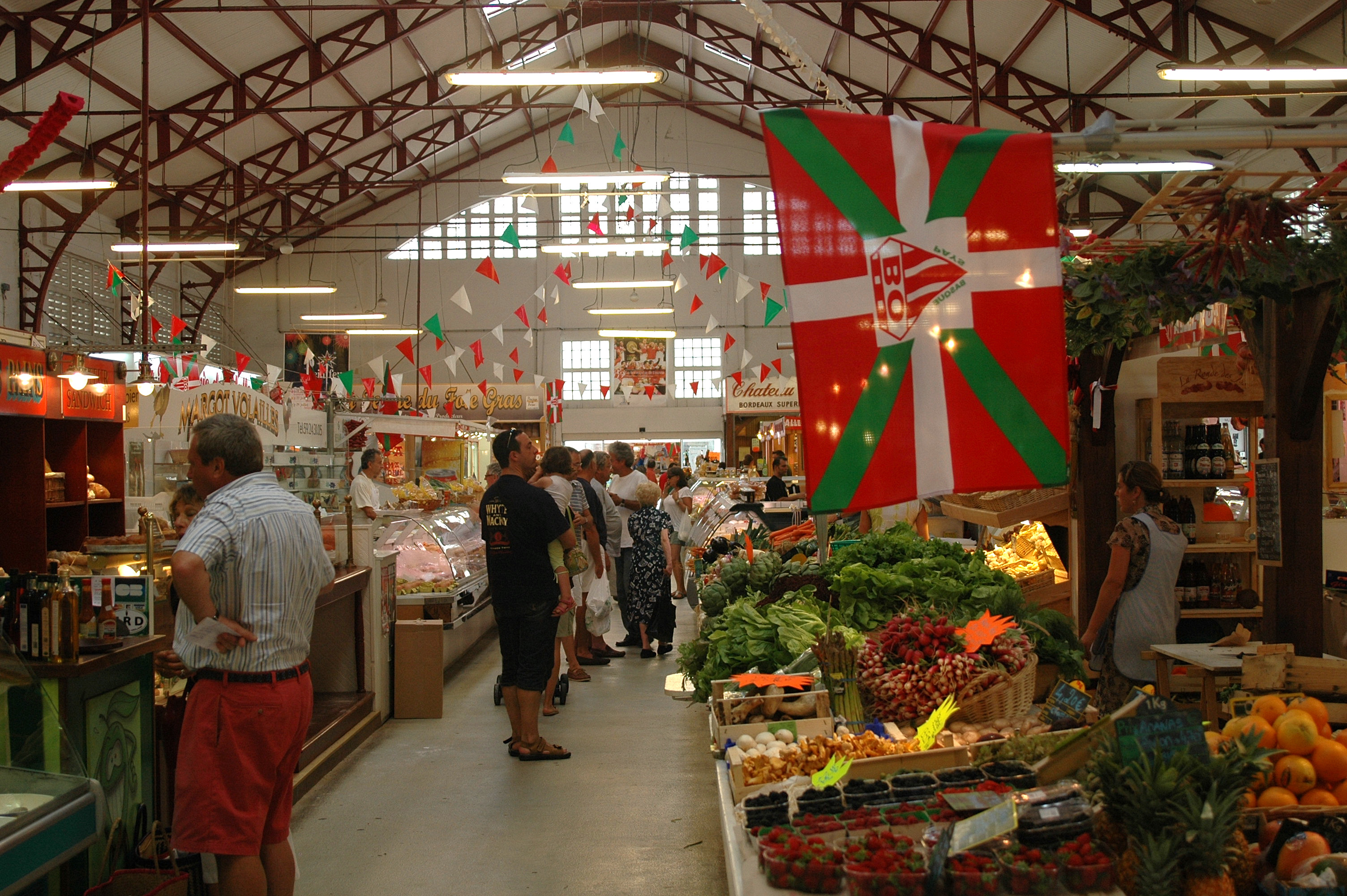 Biarritz, le marché. Photo prise le 26/07/2006 par Harrieta171Euskara: Biarritzeko azoka. 2006/07/26 an Harrieta171ek eginiko argazkia.